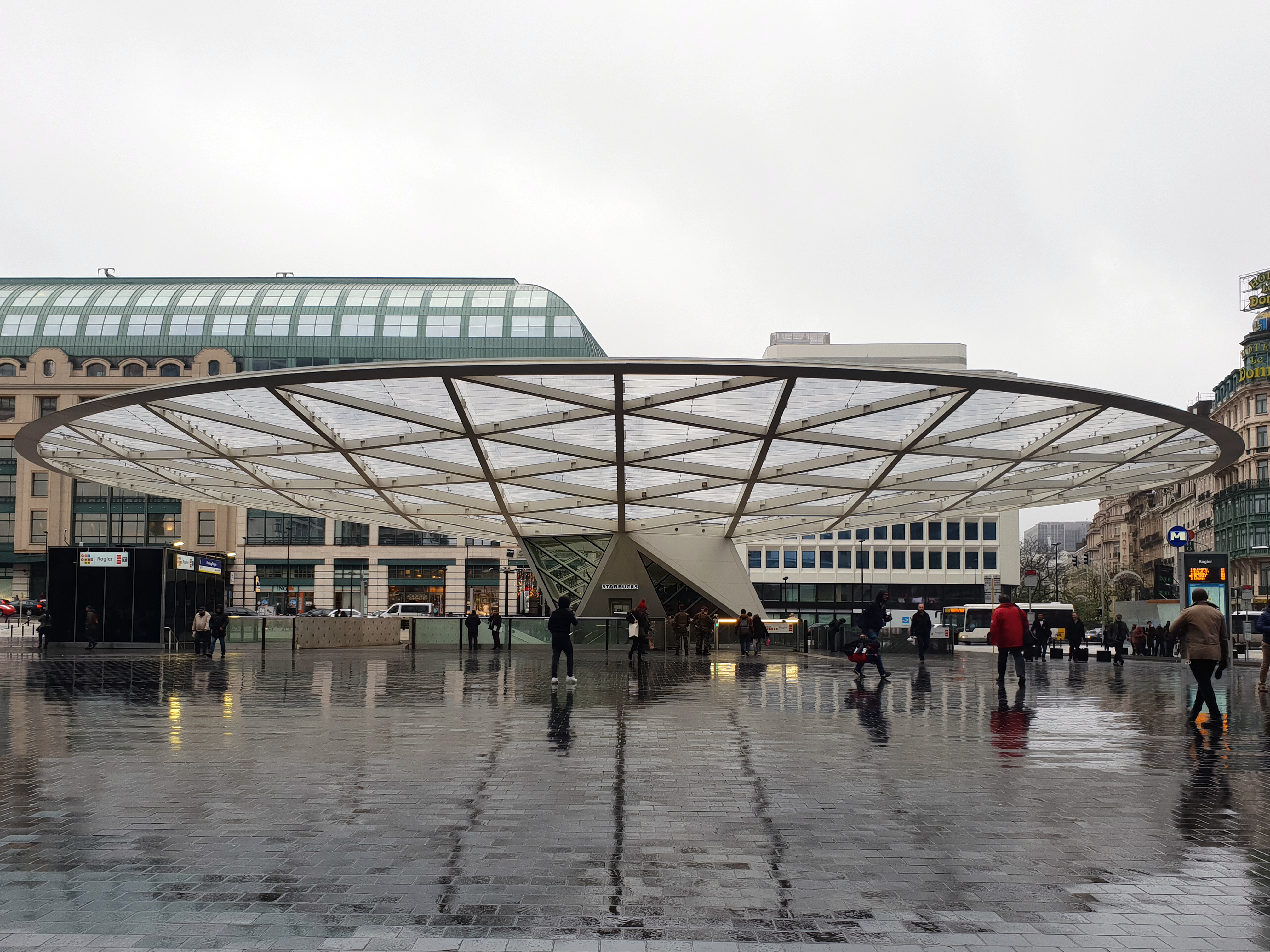 Place bruxelloise